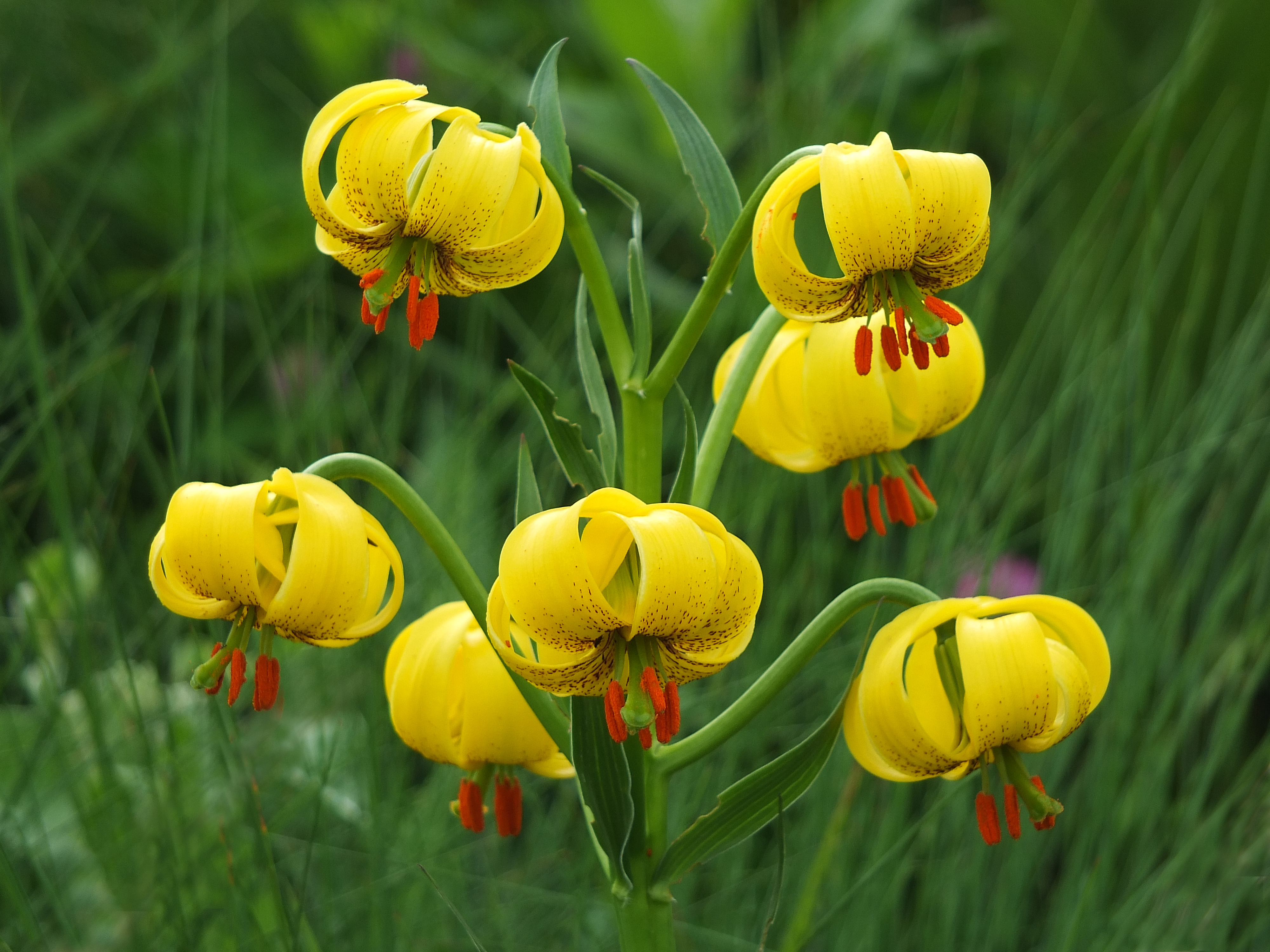 Витоша, Витоша Планински крем (Lilium jankae) със седем цвята